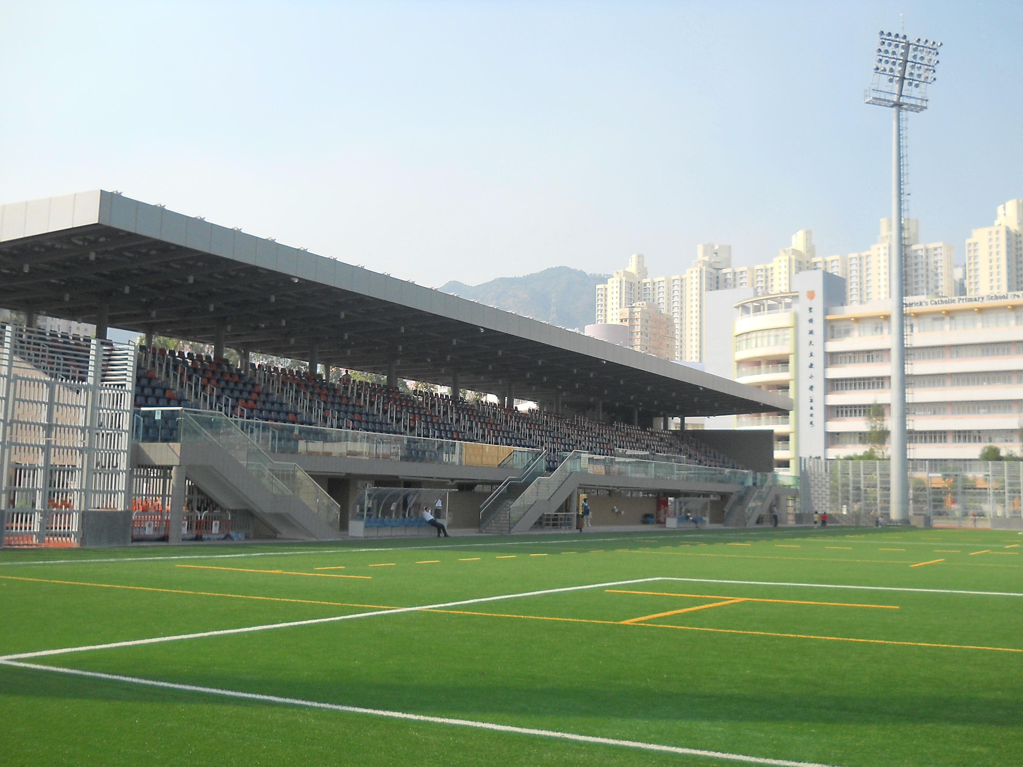 中文（香港）: 蒲崗村道公園草地球場